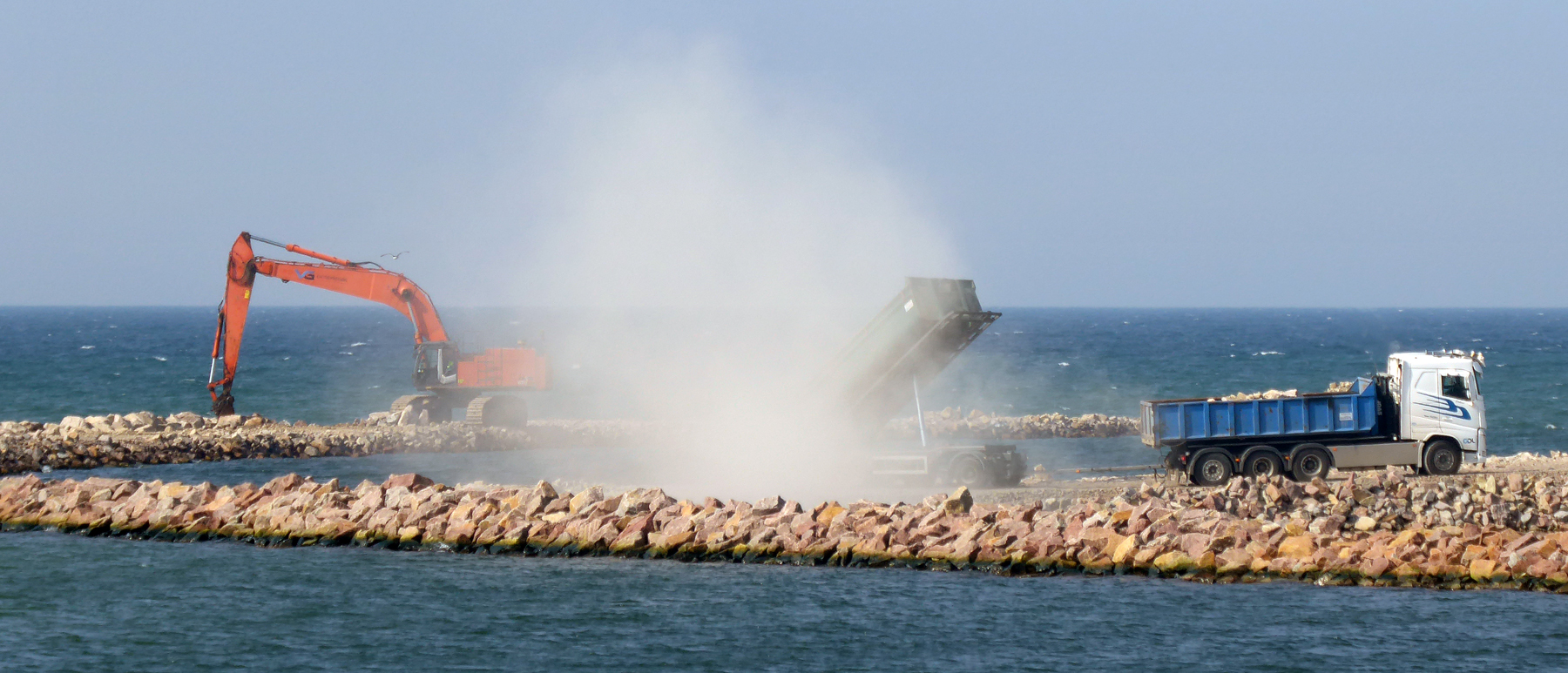 En vågbrytare under konstruktion vid Världens ände i Ystad 24 maj 2019.